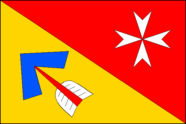 vlajka mesta Strakonice zdroj